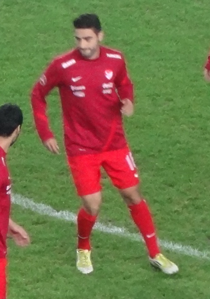 MehmetEkici Milli Takım ile